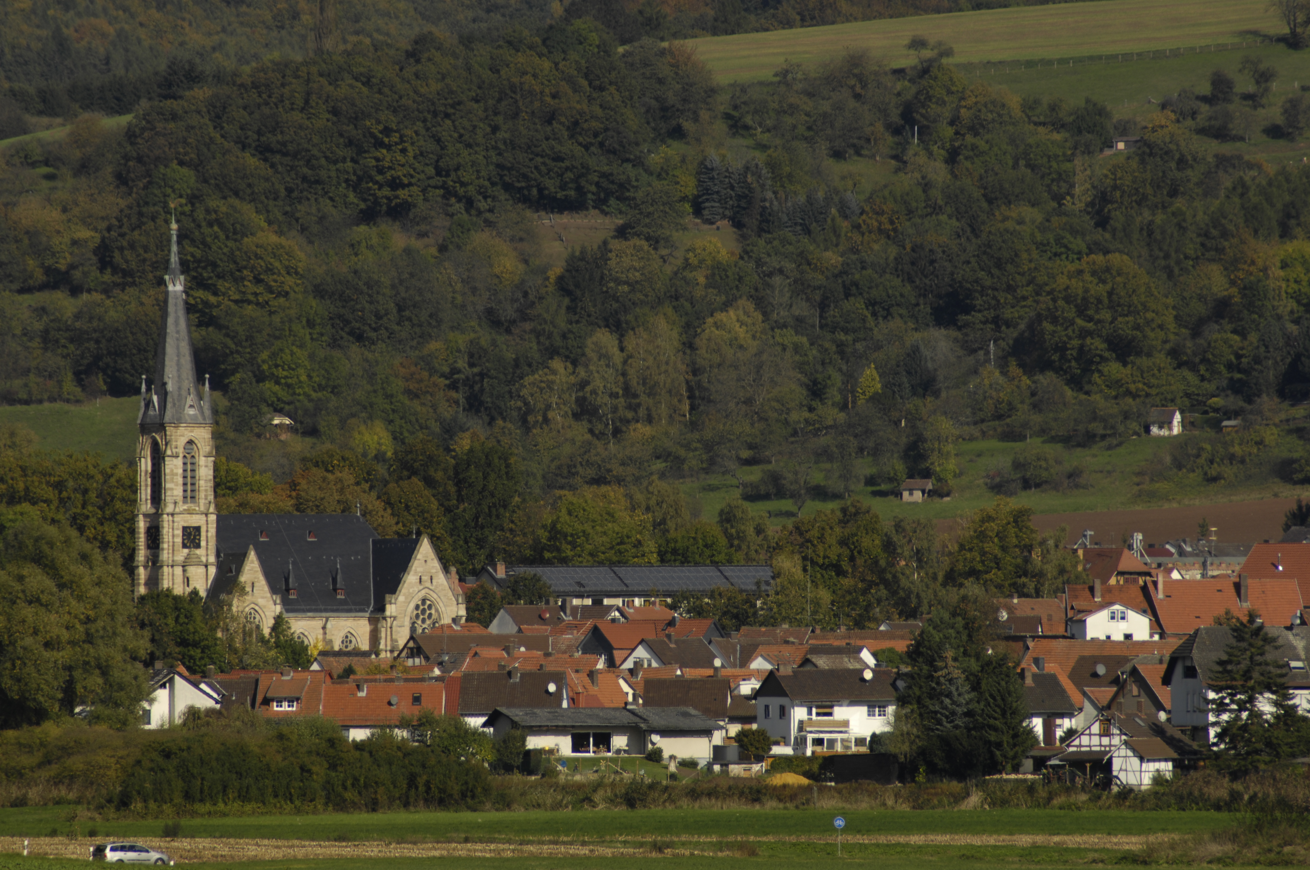 Wanfried, Stadtbild mit Kirche, Werratal